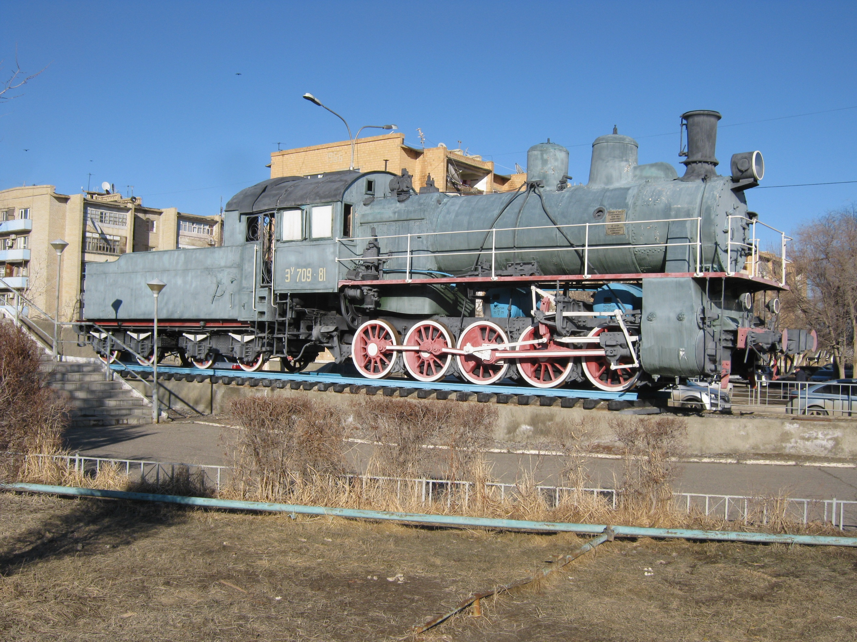 Памятник-паровоз Эу 709-81 (Байконур)